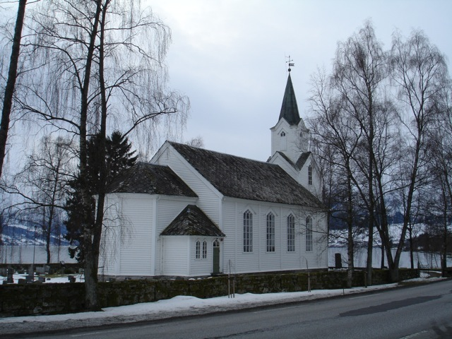 Bilete Helgheim kirke